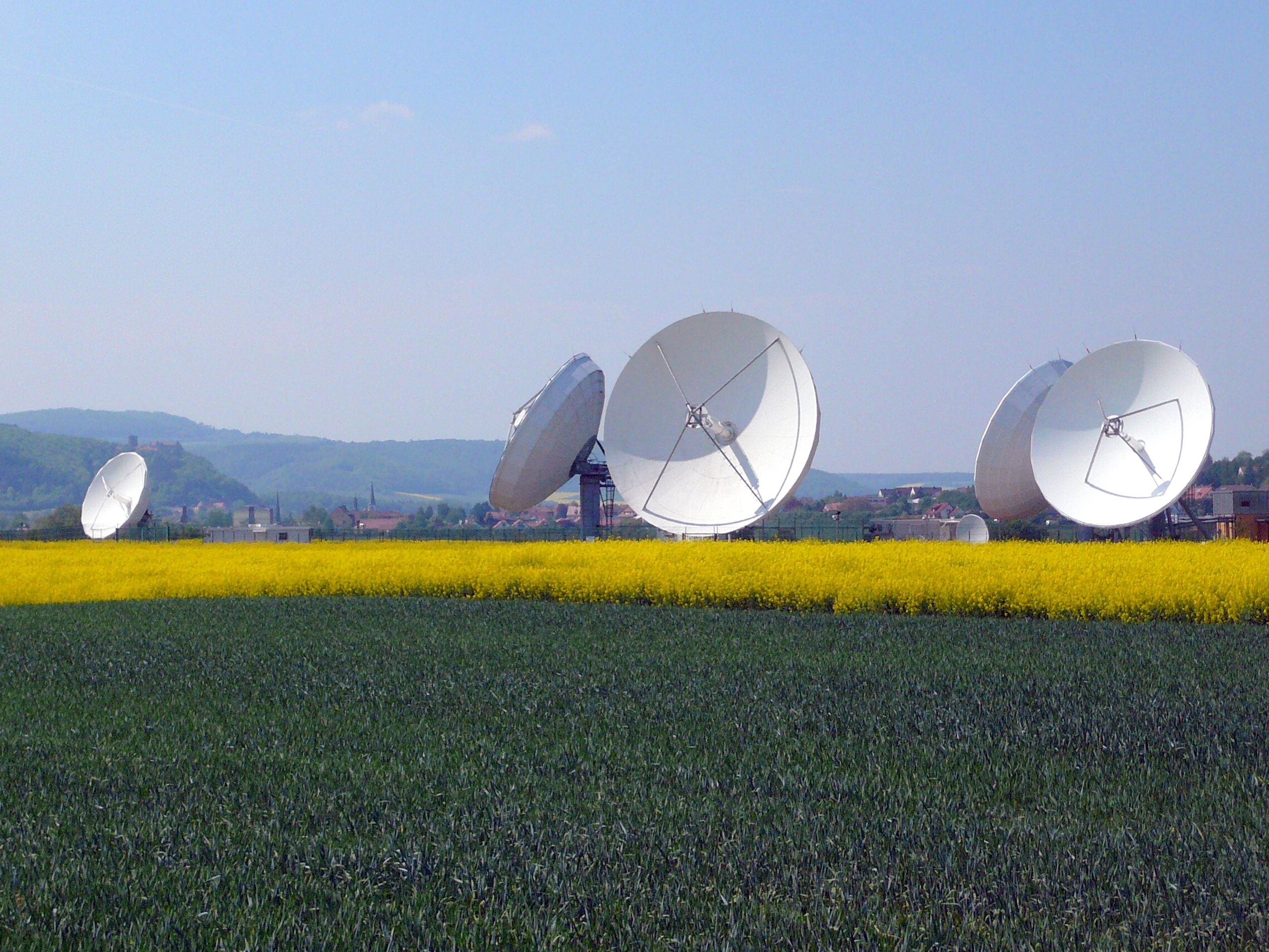 Erdfunkstelle Fuchsstadt, Deutschland, Antennenfeld vier